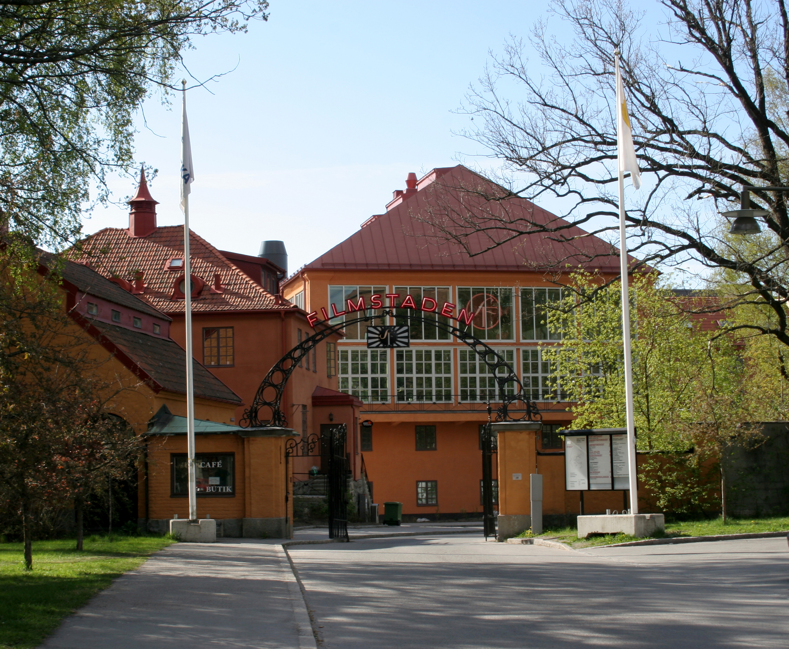 Entrance of Filmstaden, Solna, Stockholm, Sweden.